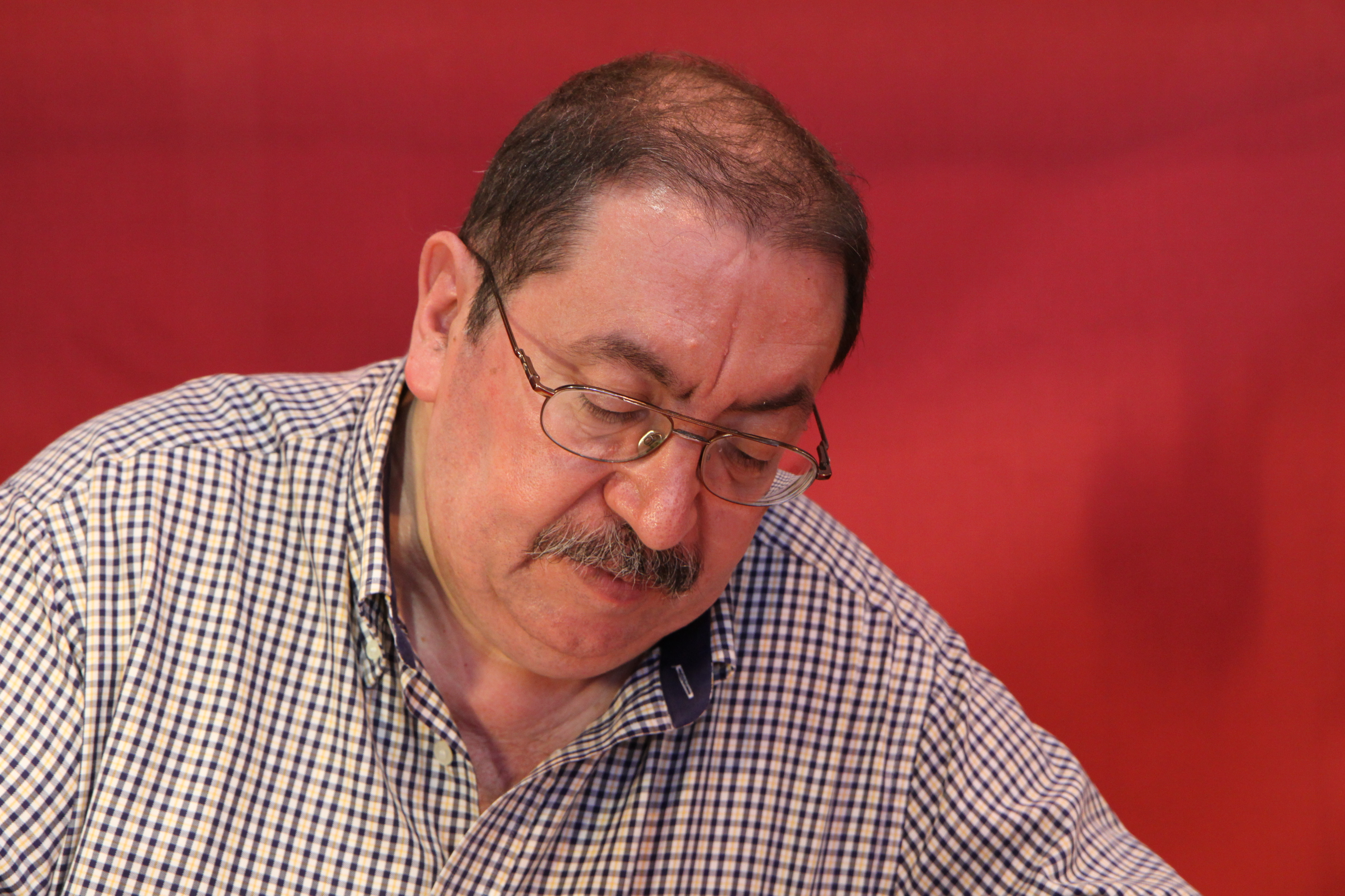 Alfonso Font photographié lors du 30ème salon du livre de Paris à la porte de Versailles.